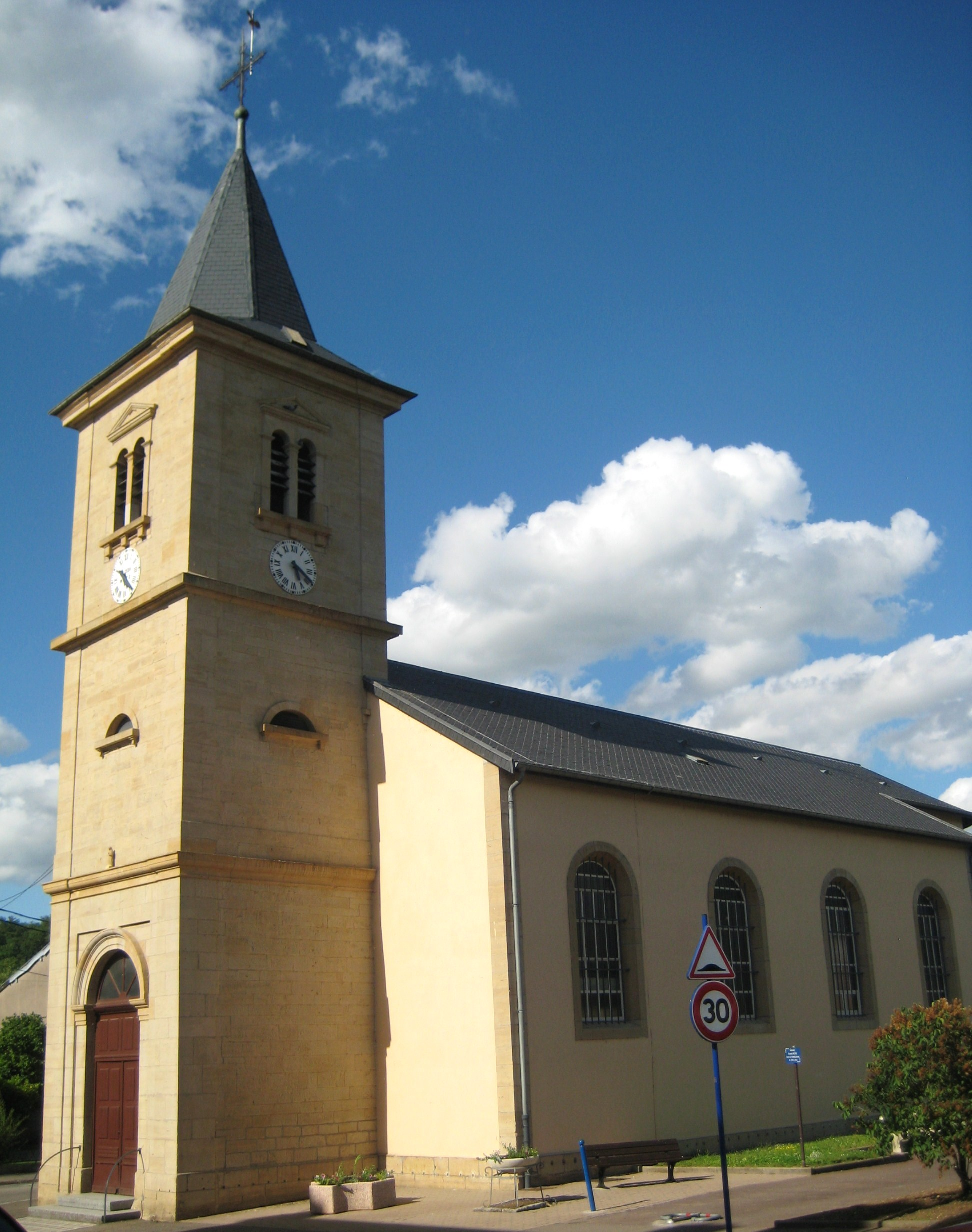 Description Église d'Homécourt Date18 May 2009Sourcemon appareil photoAuthorAimelaime Église d'Homécourt